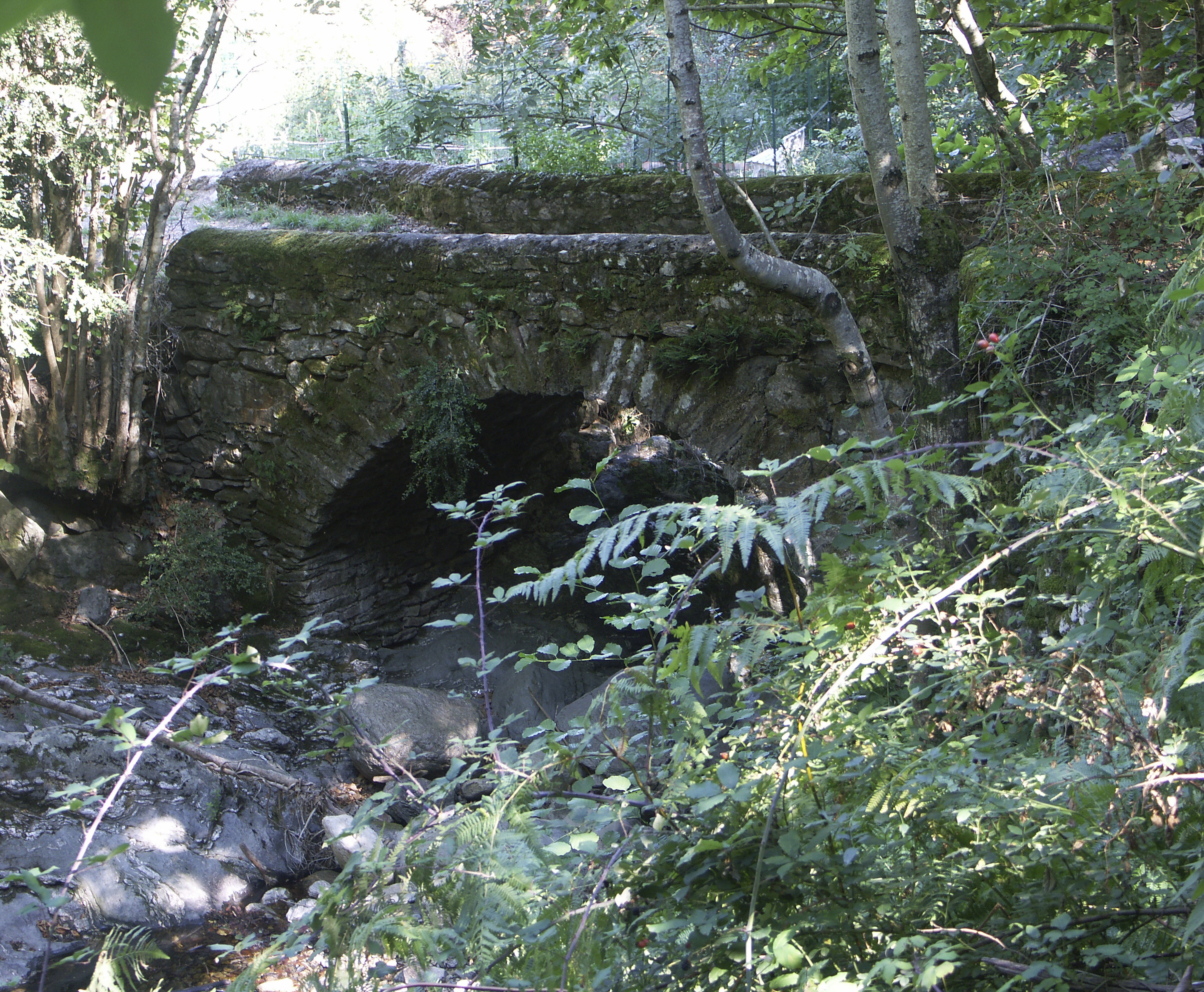 Castanet-le-Haut (Hérault) - Le Pont de la Planque sur la Mare.2ème sur la Mare.